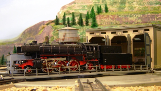 La piattaforma girevole Maerklin 7188 mentre gire una BR 23 analogica (art.3005 - produzione 1964).